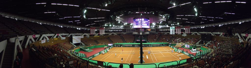 Zdjęcie zrobione podczas kobiecego turnieju tenisowego BNP Paribas Katowice Open, w katowickim Spodku.